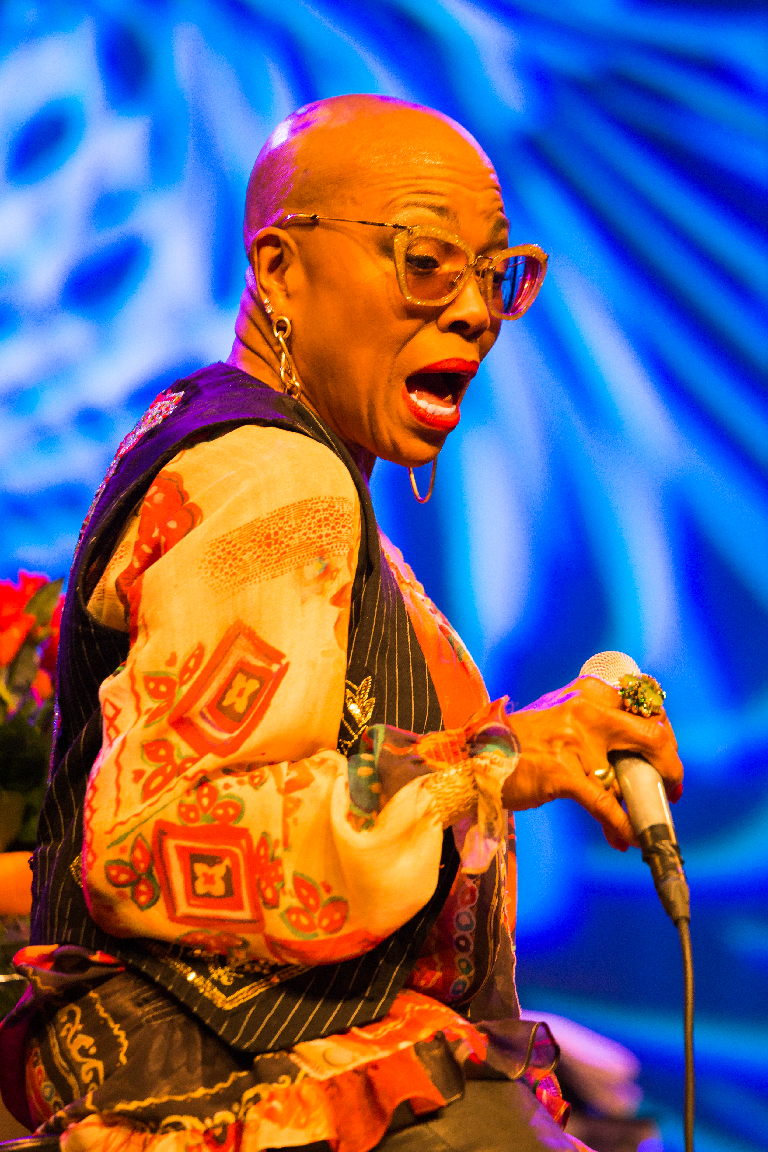 dee dee